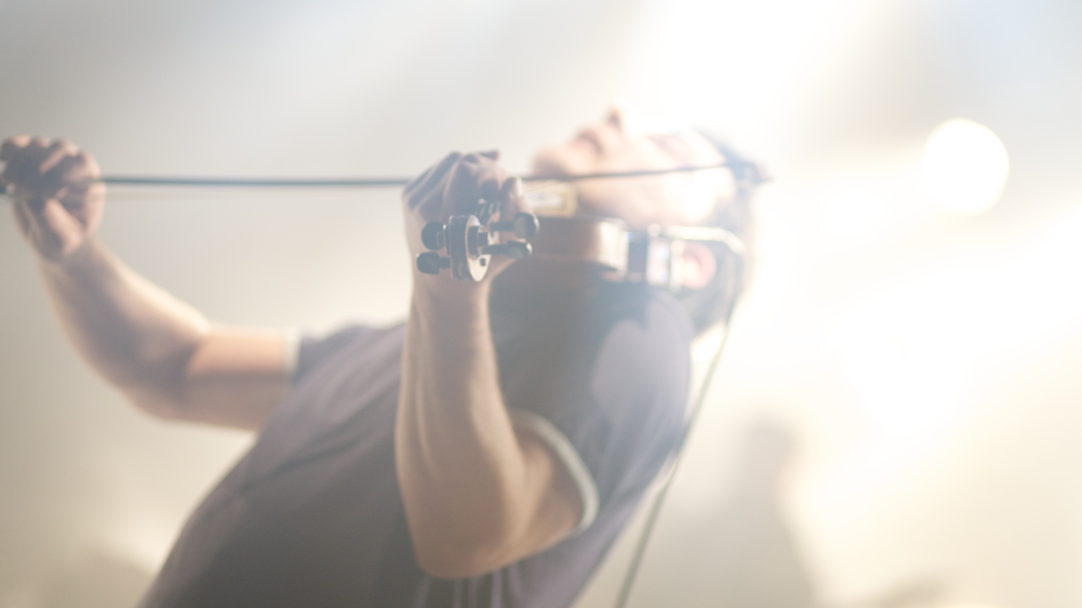 "pj" d'orange blossom en live 2